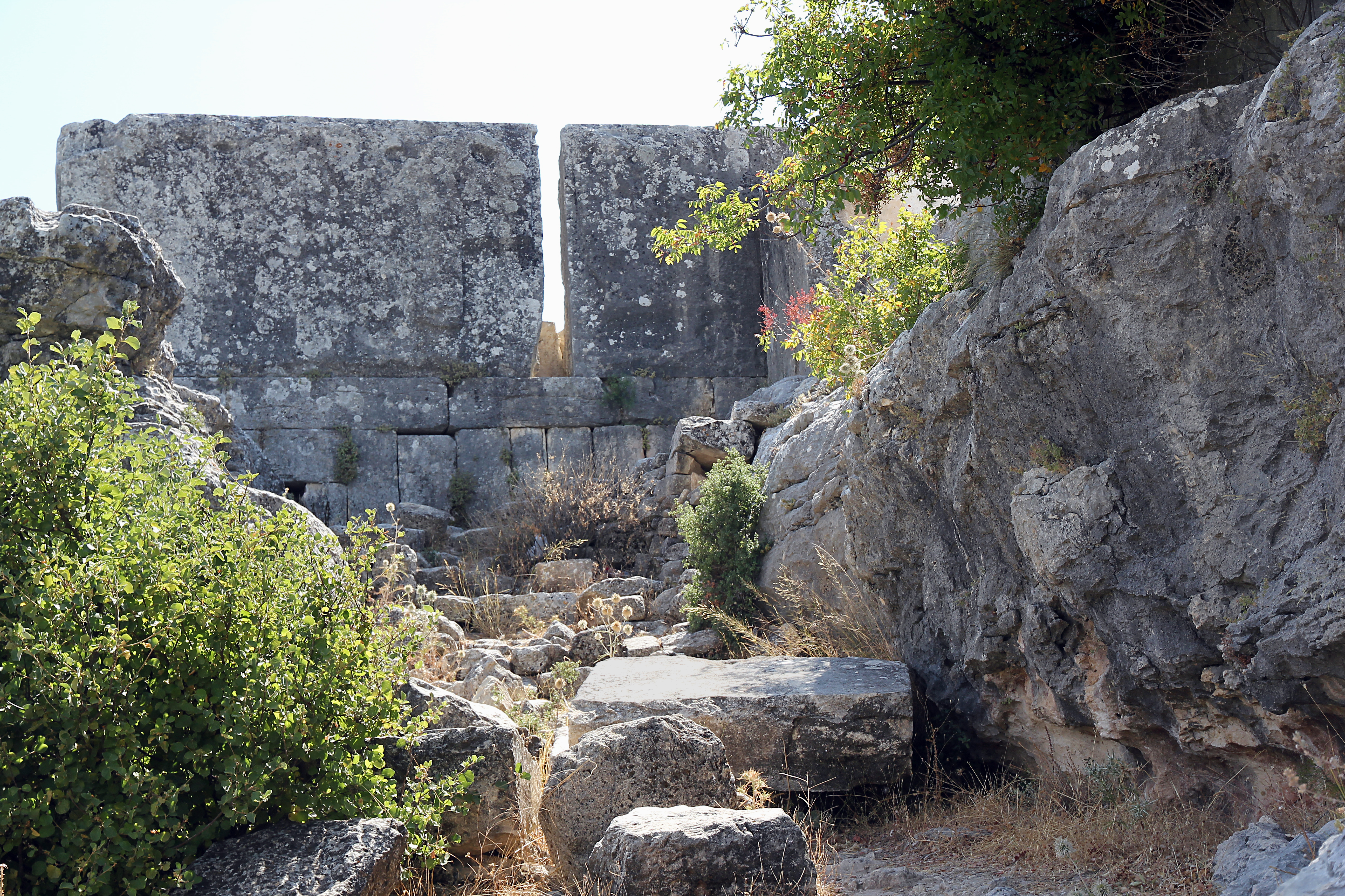 Meydancik Kalesi (Kirschu), antike Festung bei Gülnar, Südtürkei